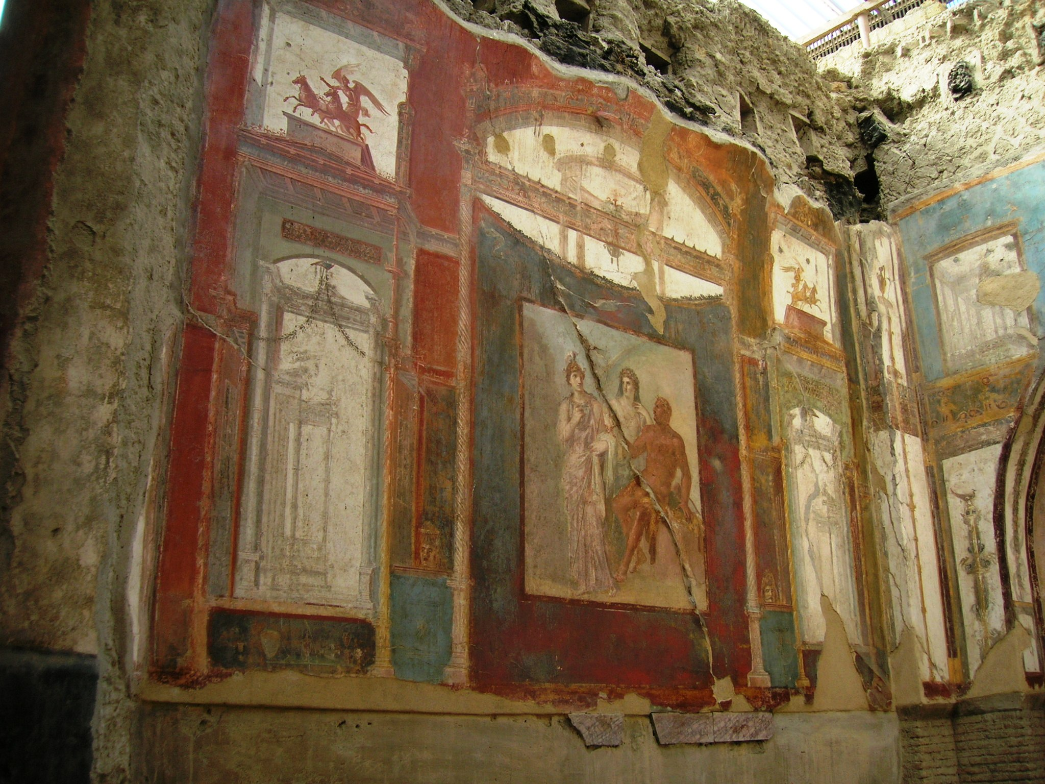 Il Collegio degli Augustali ad Ercolano